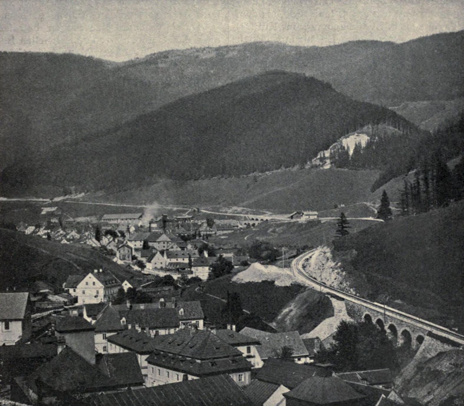 Abb. 209. Vordernberg. [Eisenerz-Vordernberg.]Vordernberg und die Erzbergbahn